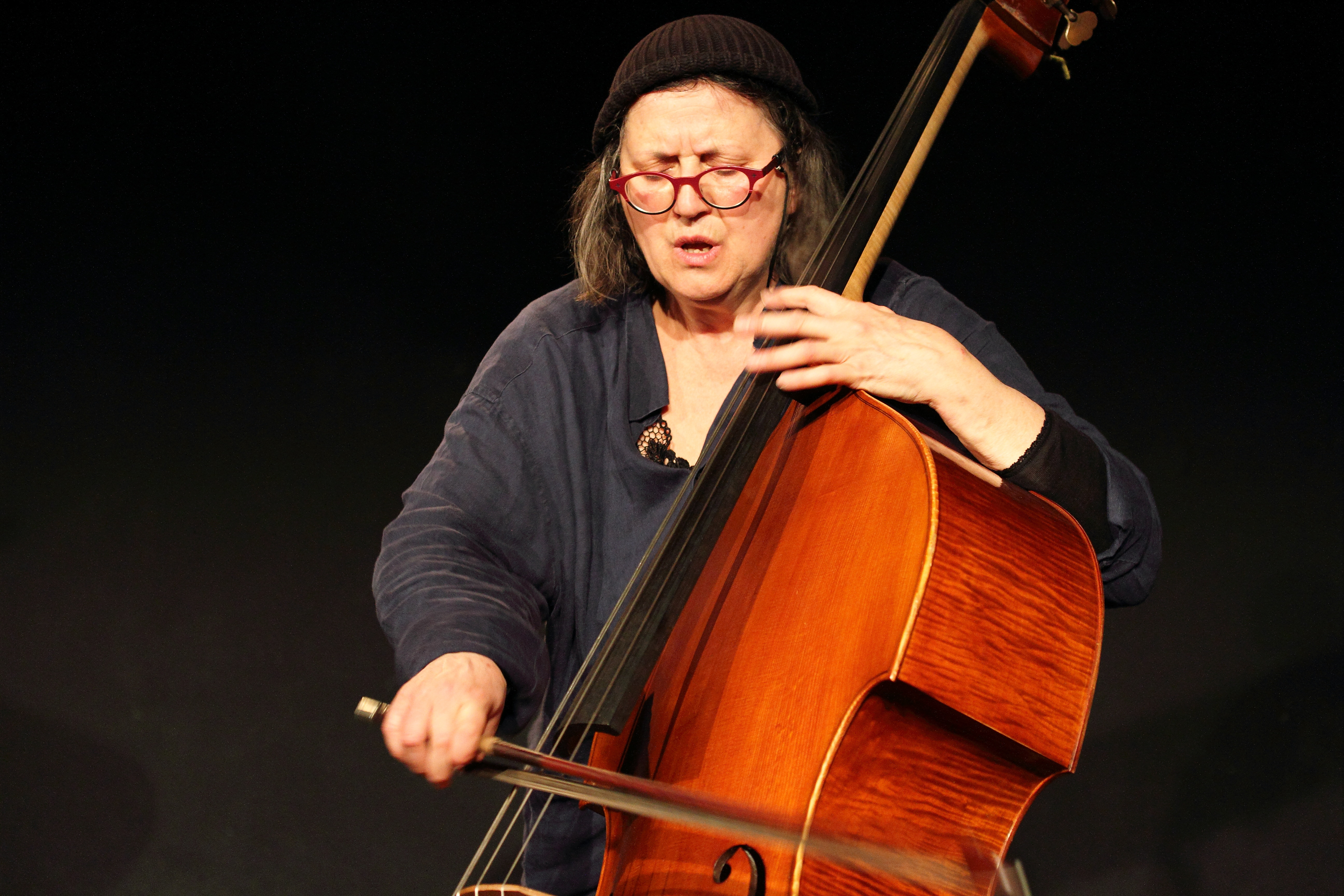 Joëlle Léandre beim Konzert mit Elisabeth Harnik im KULT. Eine Veranstaltung des Kulturamtes Niederstetten mit dem Club W71.